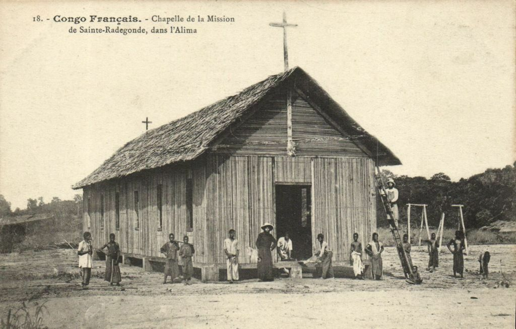 18=* Congo Français - Chapelle de la Mission de Sainte-Radegonde dans l'Alima. * Pas de mention d'auteur, d'éditeur ou de date *Congo Français